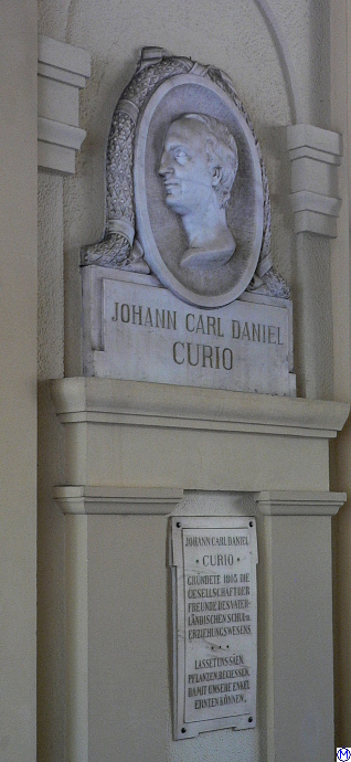 Medaillon von J.C.D. Curio im Curiohaus, Hamburg 21.4.2005